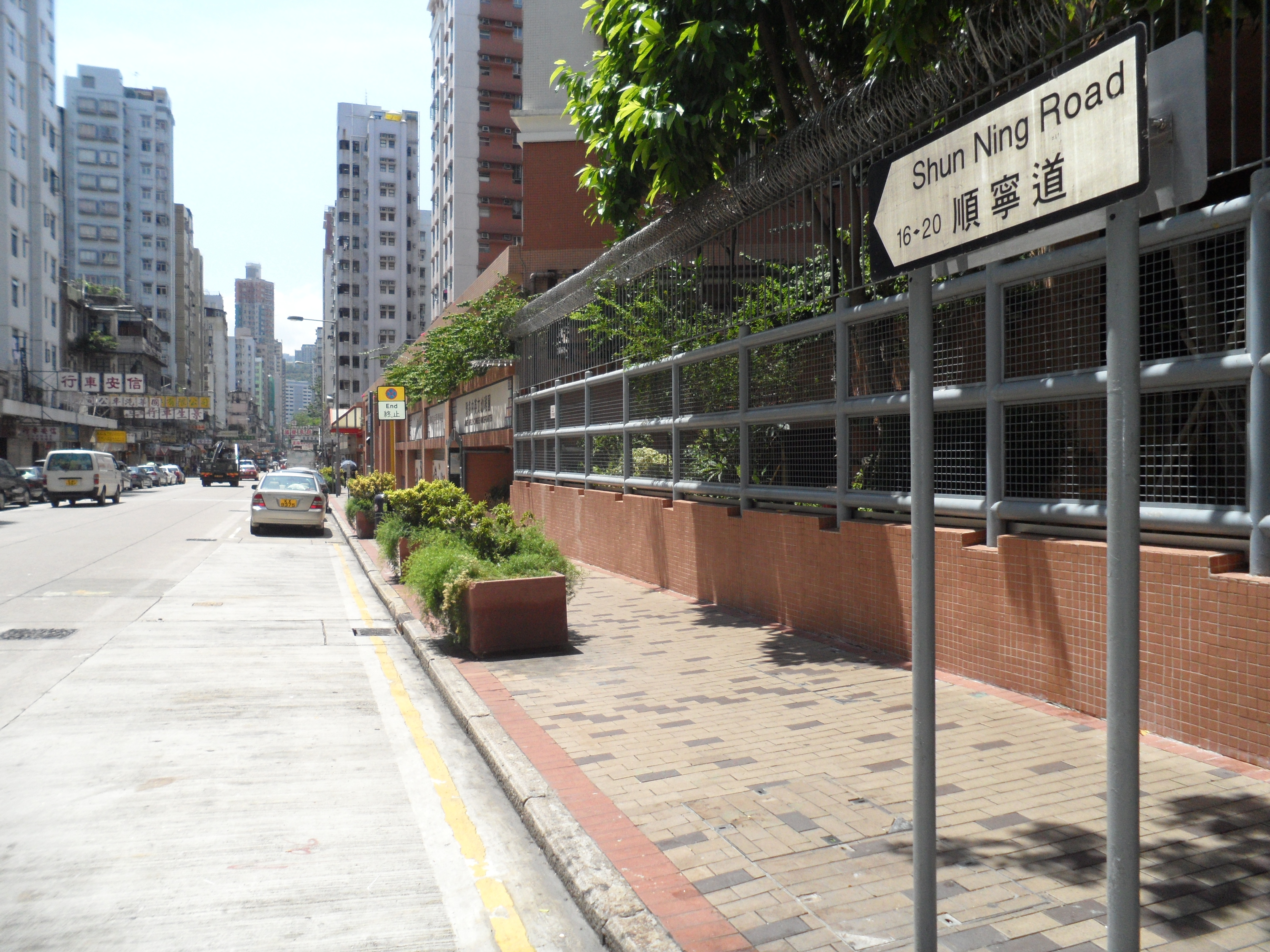 順寧道鄰近九江街路段